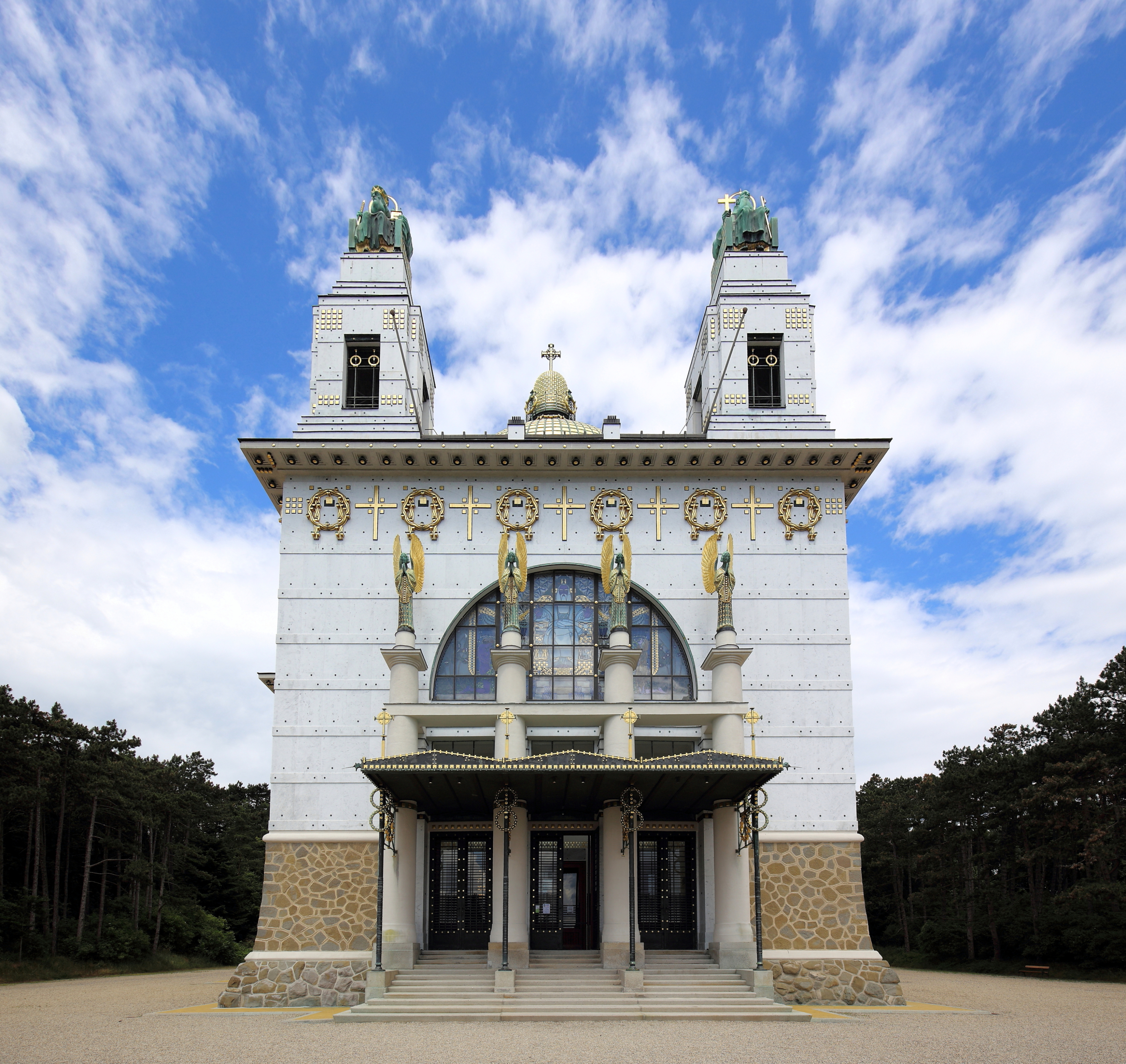 Hauptfassade bzw. Südansicht der Kirche am Steinhof, auch Leopoldskirche bezeichnet, auf dem Gelände des „Sozialmedizinischen Zentrums Baumgartner Höhe“ im 14. Wiener Gemeindebezirk Penzing. Die Kirche wurde von 1904 bis 1907 über dem traditionellen Grundriss eines griechischen Kreuzes nach Plänen des Architekten Otto Wagner als Anstaltskirche errichtet. Sie ist der bedeutendste Sakralbau der Wiener Moderne in Wien.